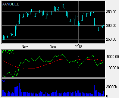 On Balance Volume (OBV) Indicator. Bovenste sectie: aandelen chart. Middelste sectie: OBV Indicator. Onderste sectie: dagvolumes in staafgrafiek.